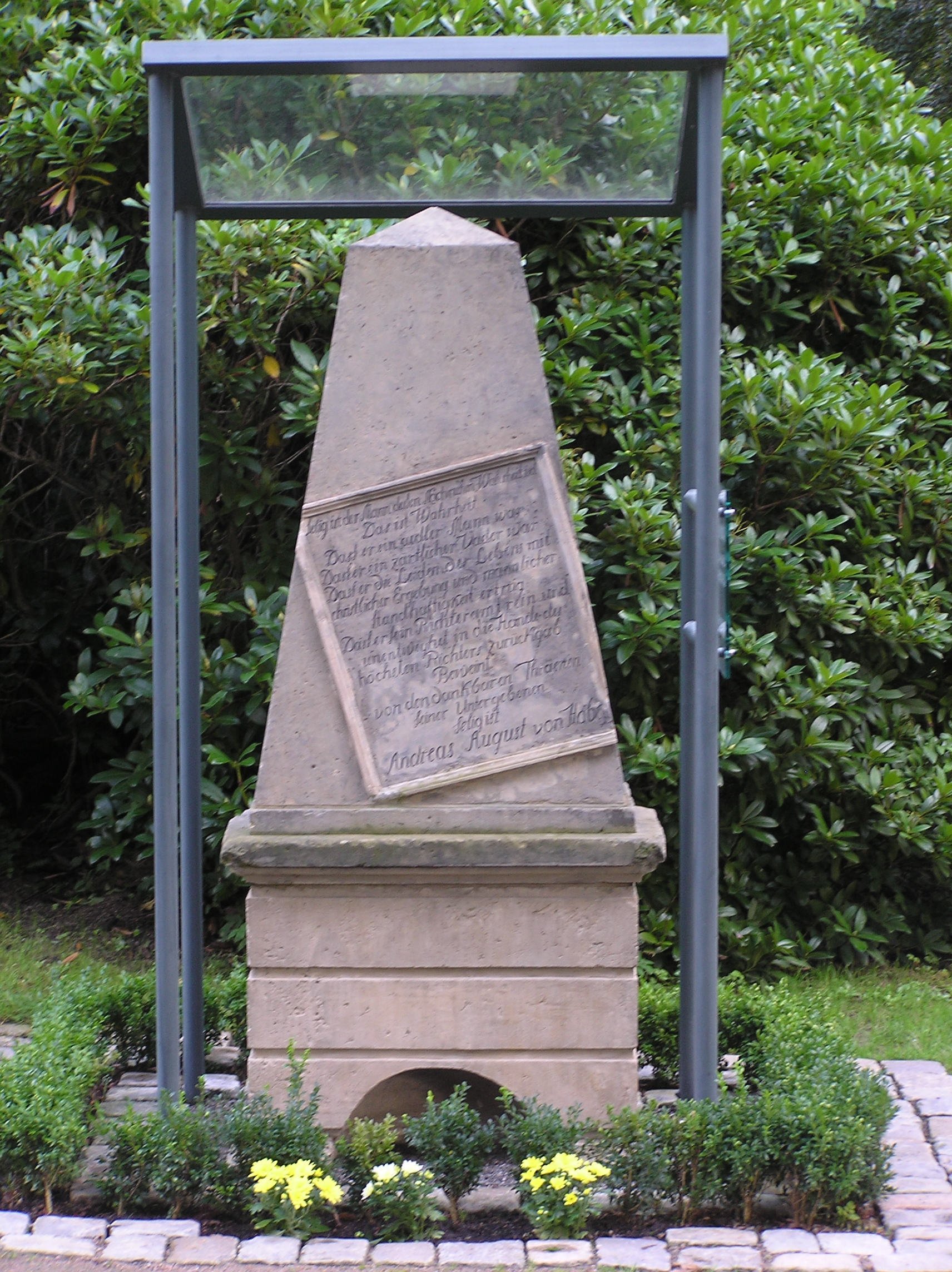 Sandstein-Obelisk August von Hobe